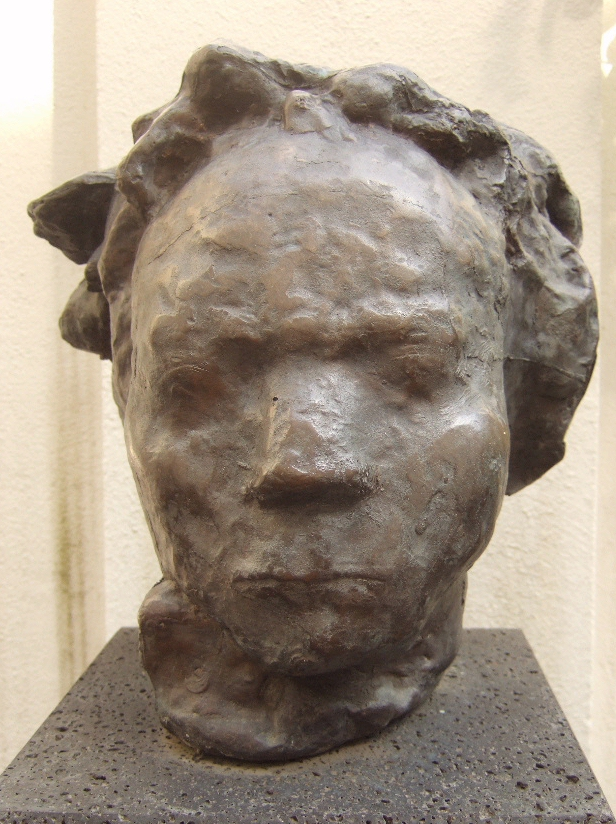 Lewon Konstantinowitsch Lasarew: Beethoven (1981) – Garten des Beethovenhauses in Bonn